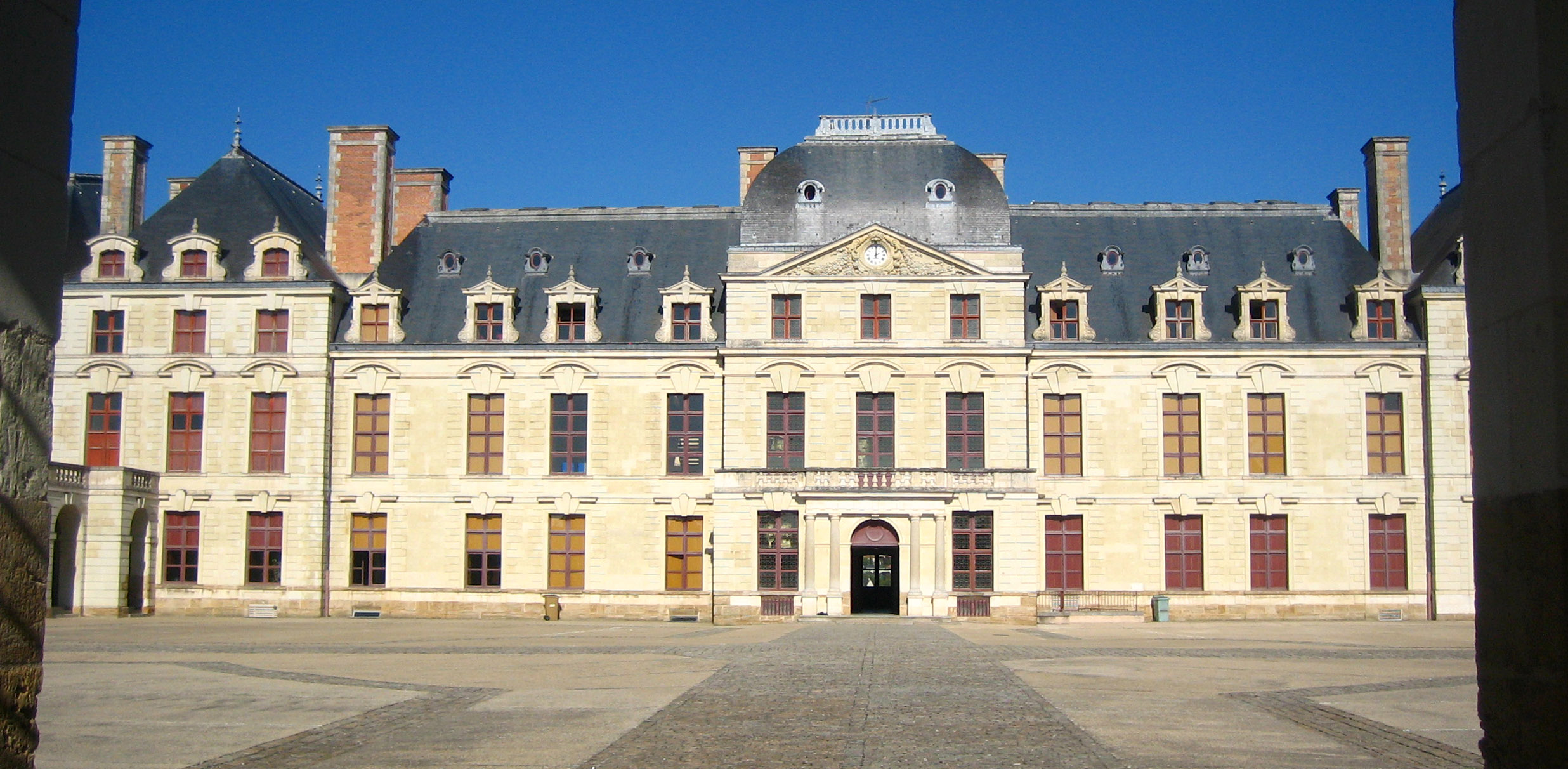 Château des Ducs de la Trémoïlle à Thouars .